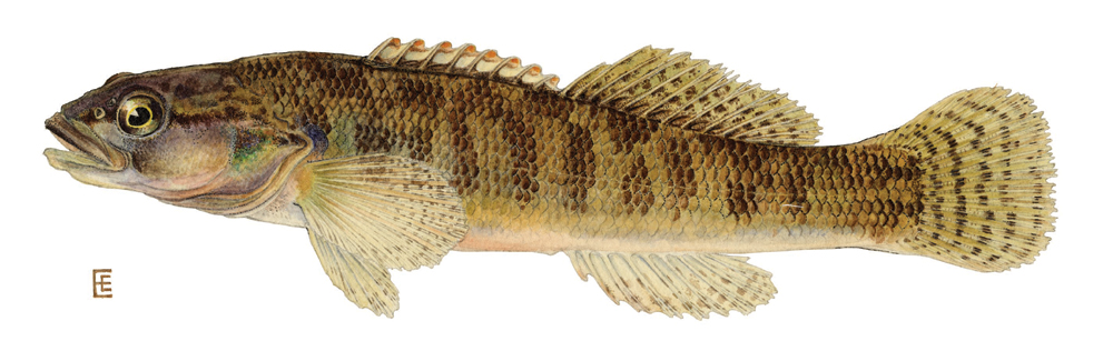 Fantail darter (Etheostoma flabellare)